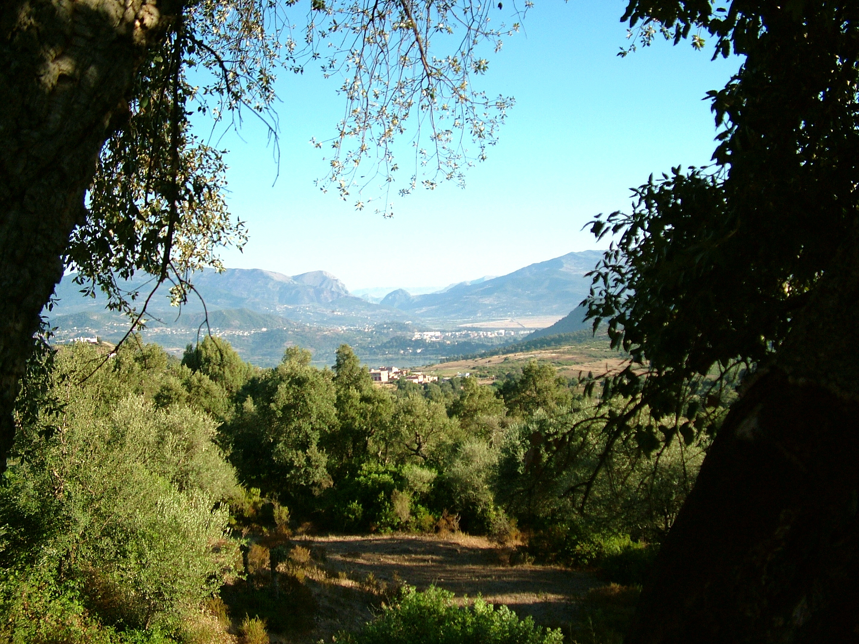 Une fenêtre sur El Milia (wilaya de Jijel, Algérie).